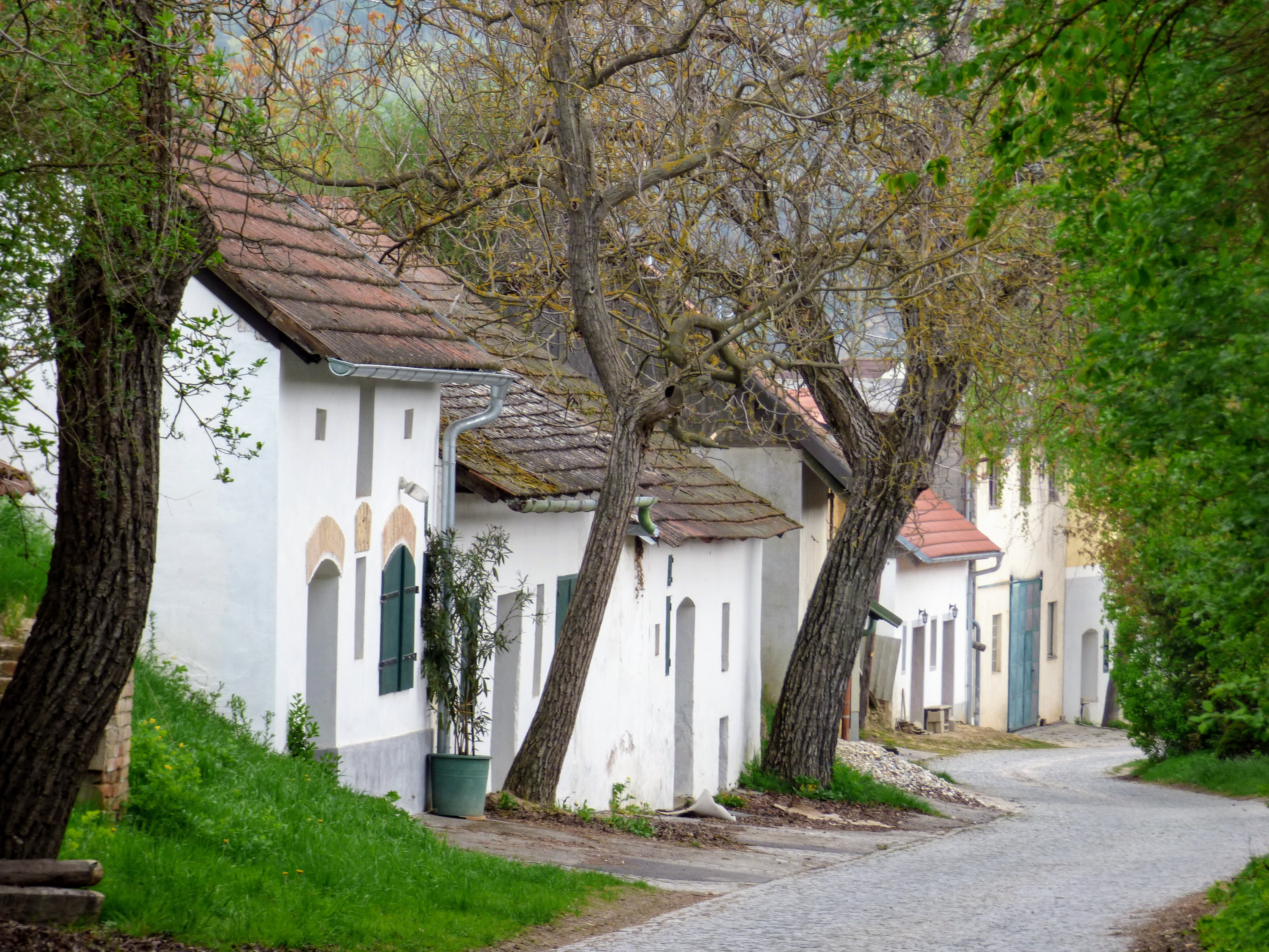 Kellergasse Reithergraben, Großriedenthal (Niederösterreich)